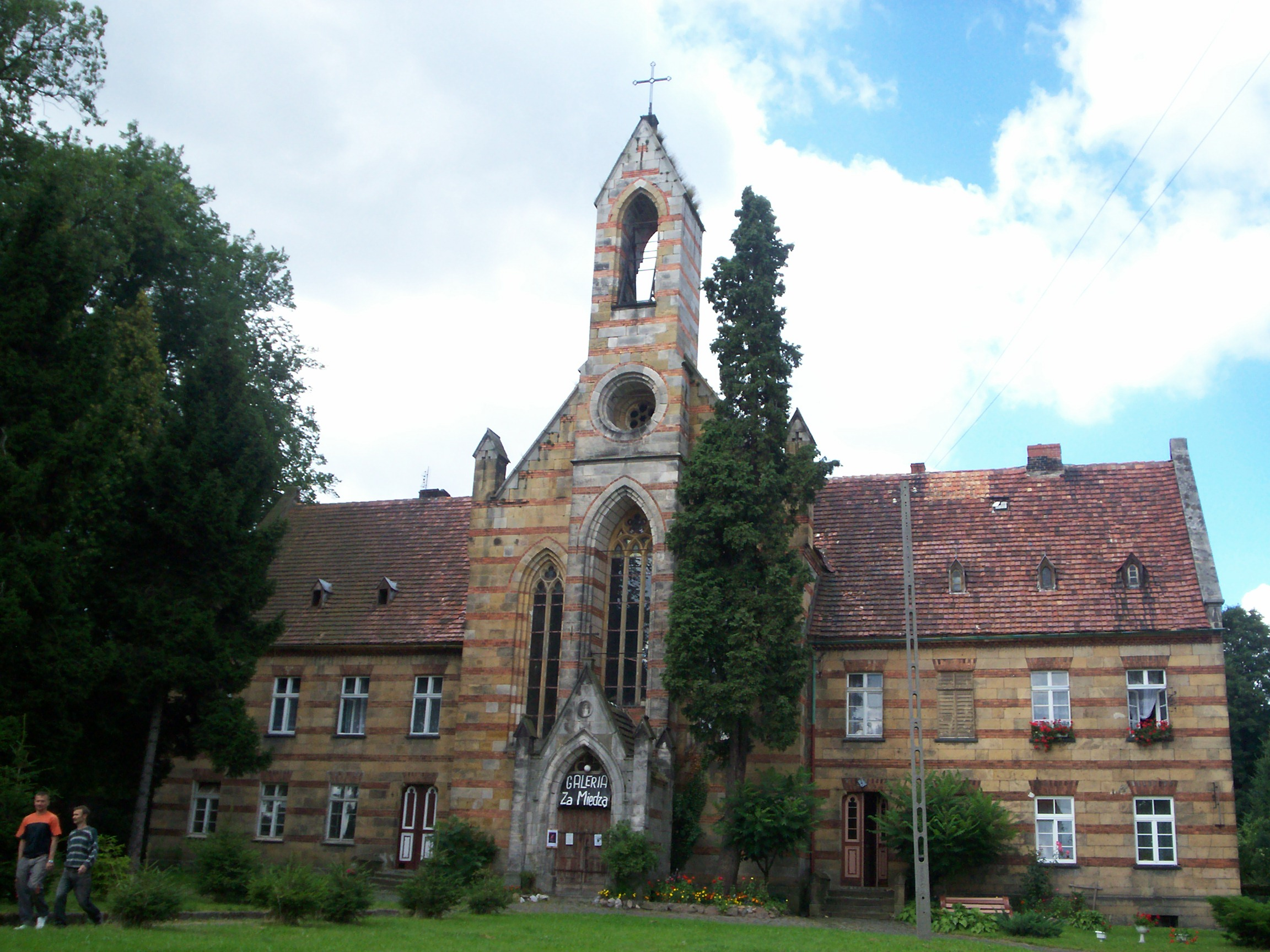 Lubomierz, dawny kościół ewangelicki.